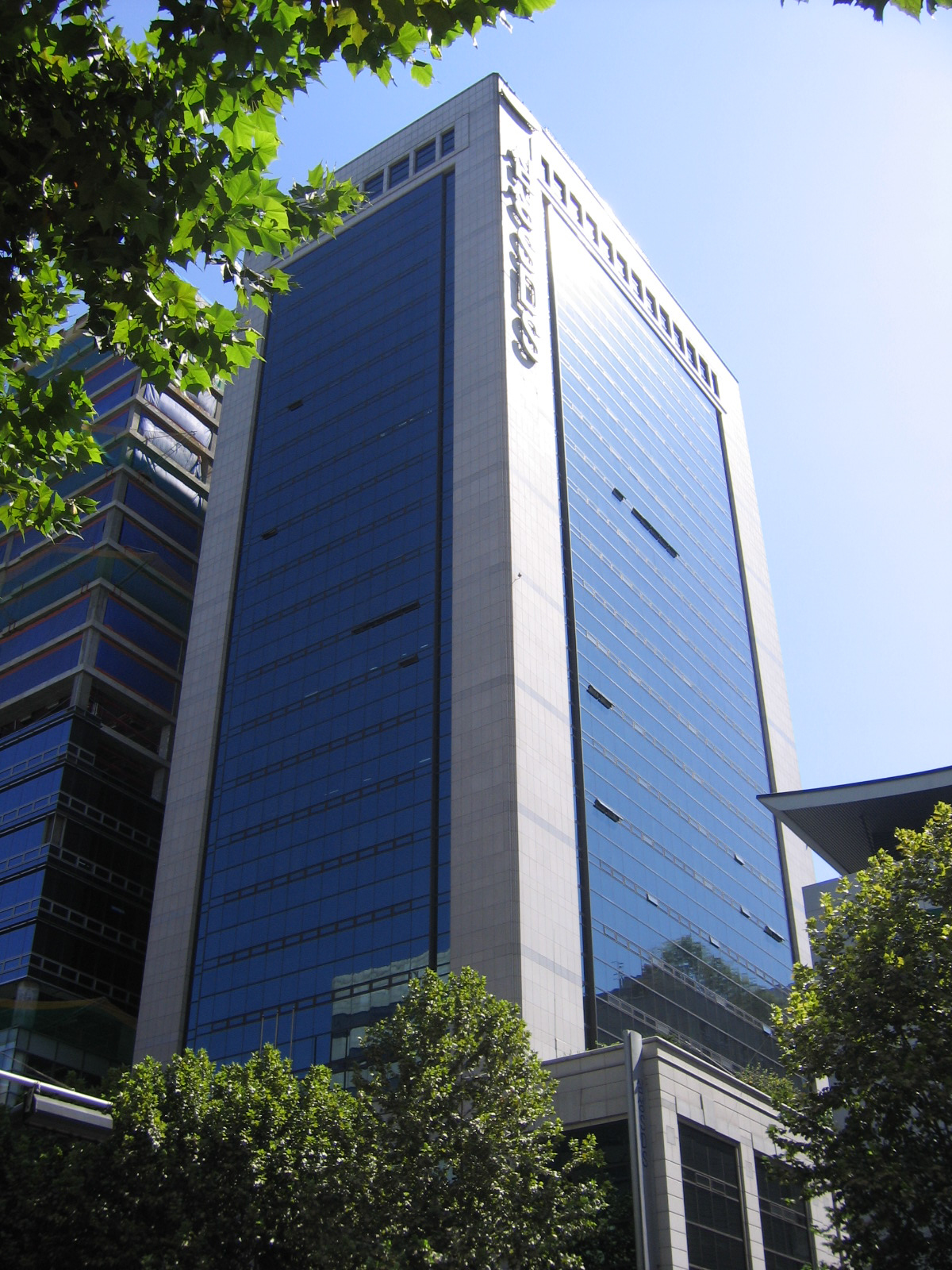 Samsung SDS Building in yuksamdong, Kangnam-gu, Seoul, Republic of Korea